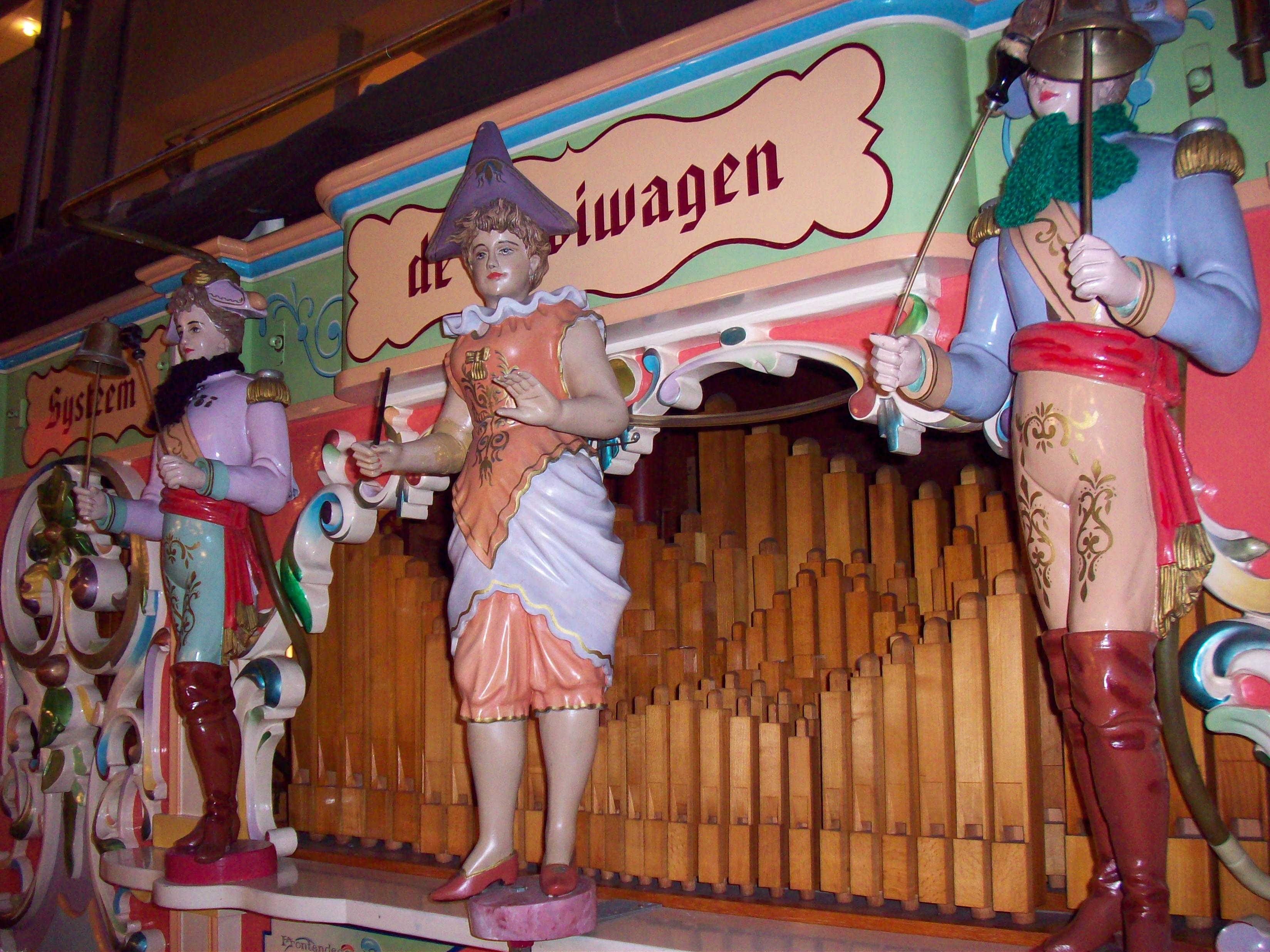 Draaiorgel de Hooiwagen, in het centrum van Arnhem tijdens de draaiorgeldag op 27-12-2009.